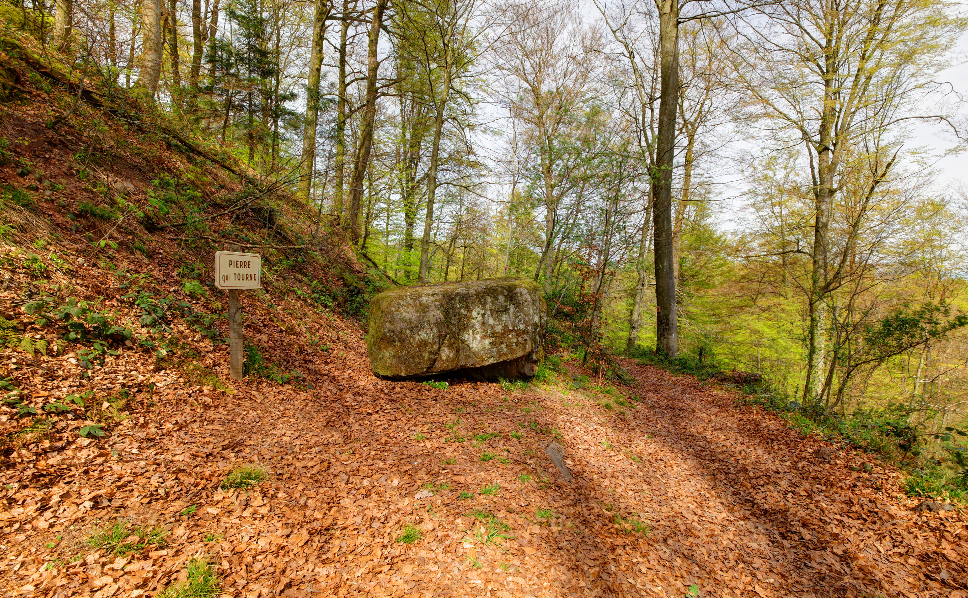 La Pierre qui tourne, à Champey. La légende dit que cette pierre tourne sur elle-même pendant la nuit de Noël tous les cent ans à minuit. La dernière fois, cela aurait été en 1984. La légende dit aussi qu’elle cache le trésor des druides et qu’il est possible de le récupérer à ce moment-là. Photo réalisée avec un filtre ND1000.